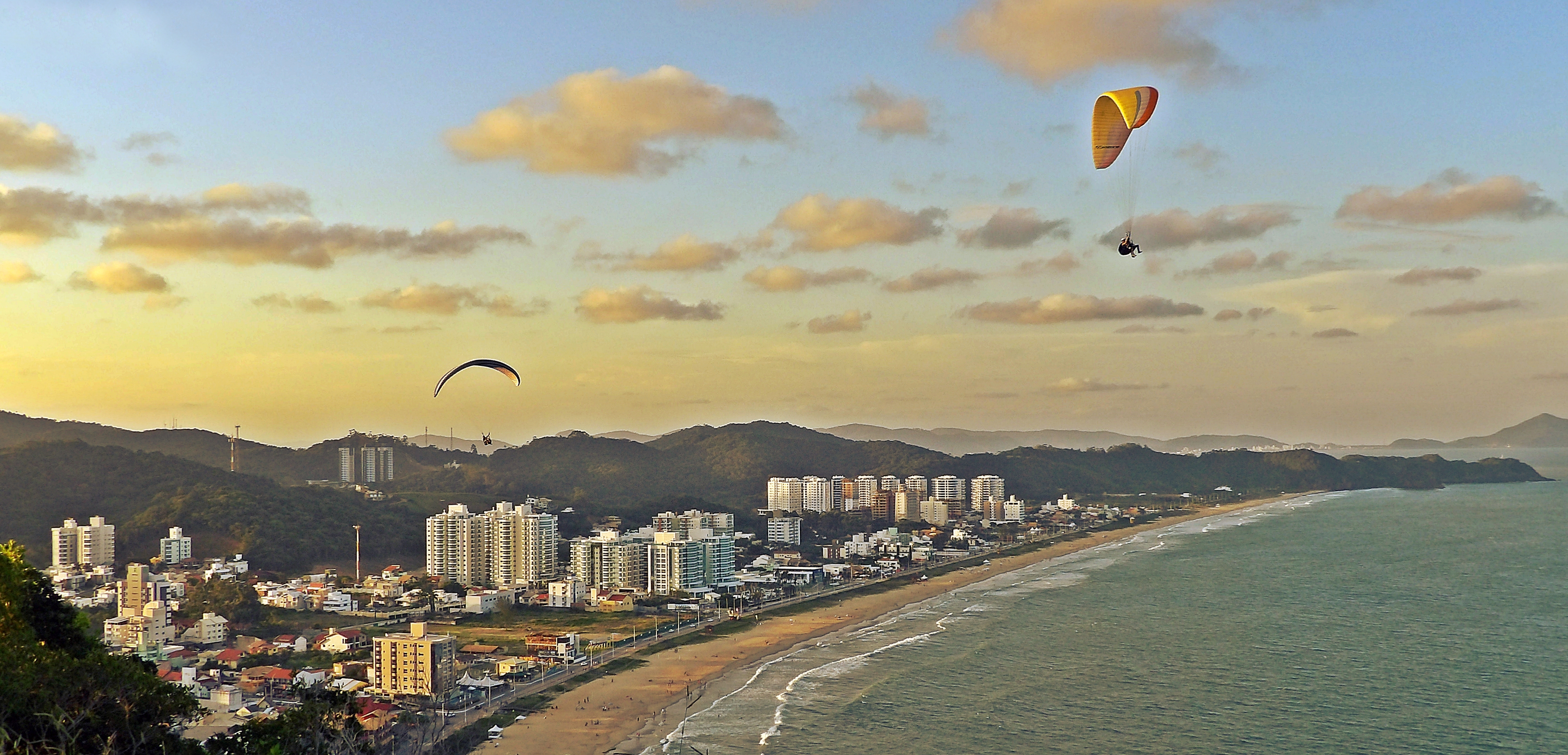 Vista Praia Brava a partir do Morro do Caréca.